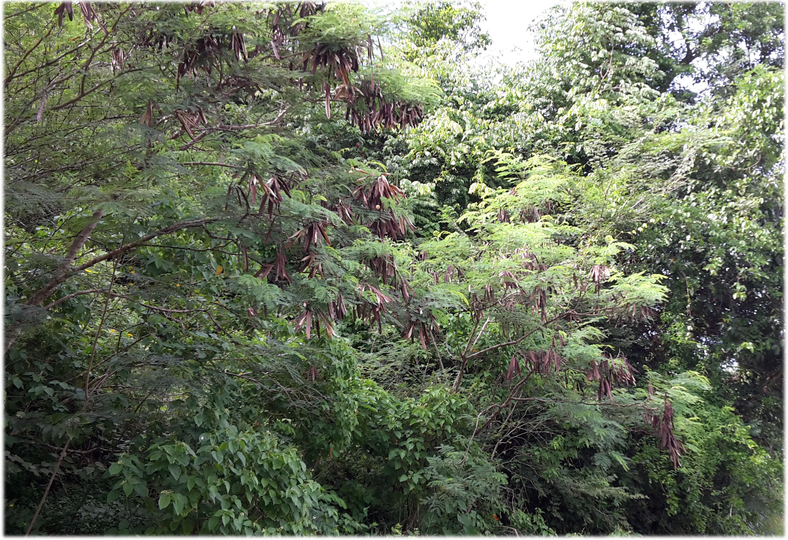 Arbustes avec branches d'où pendent des gousses de Leucaena leucocephala aux Trois îlets en Martinique